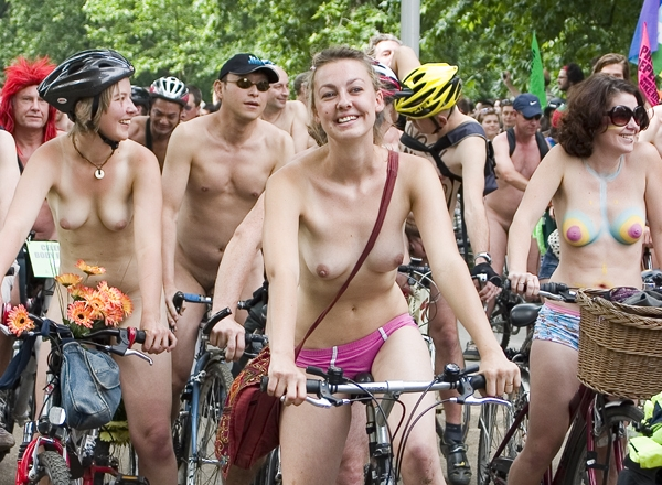 World naked bike ride